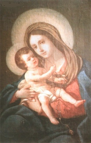 Madonna col Bambino, olio su tela, 53 x 36 cm, Santuario del Ghiandolino, Imola